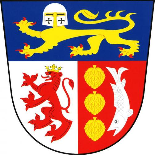 znak, Tupadly, okres Kutná Hora